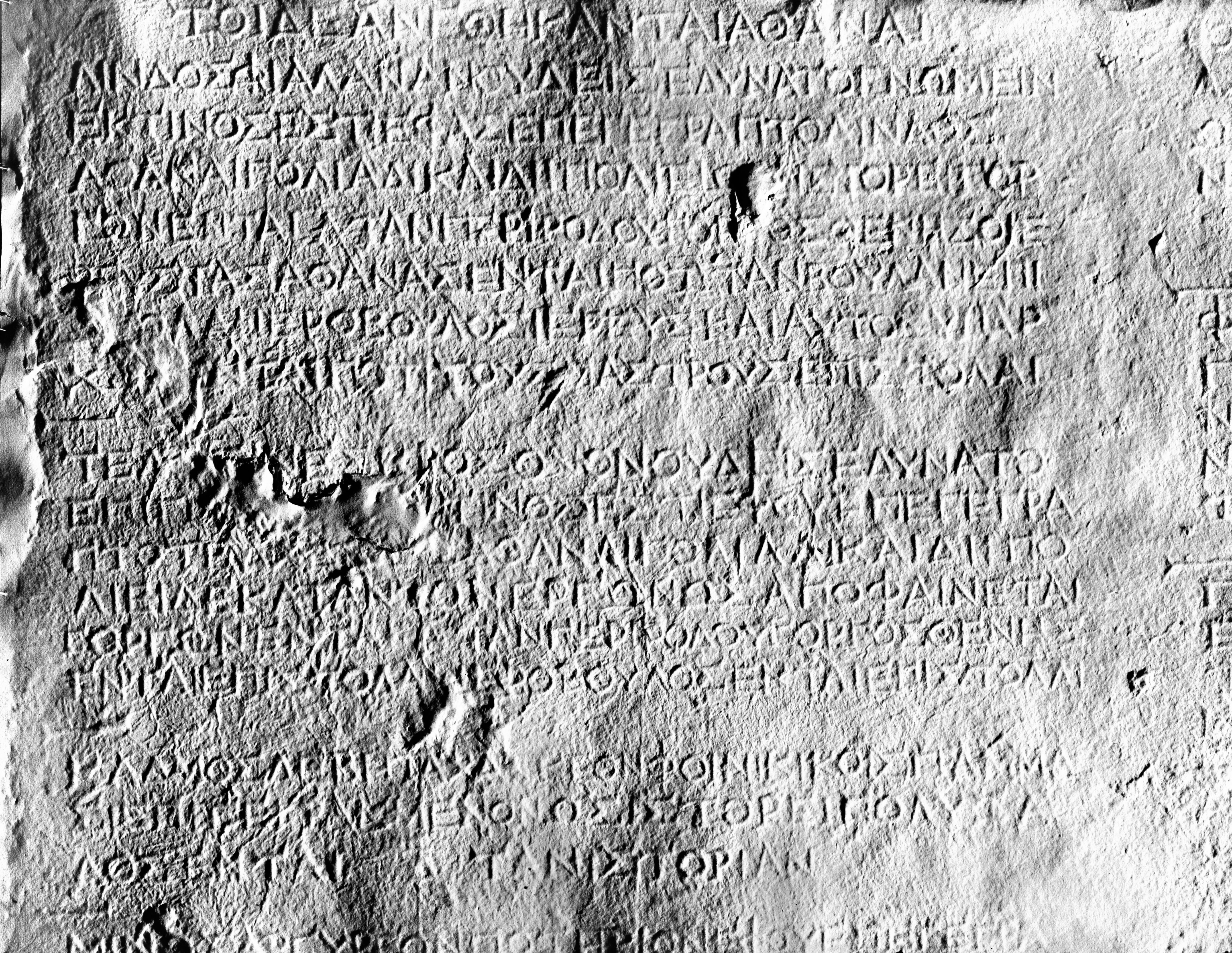 Tempelkrøniken, stele brudt i to stykker, beskadiget ved afsprængning, afmeisling (på to steder) og ved fodslid. Stelen indeholder "den lindiske tempelkrønike", H. 2,37 m. br. 0,85 m D. 0,23 m